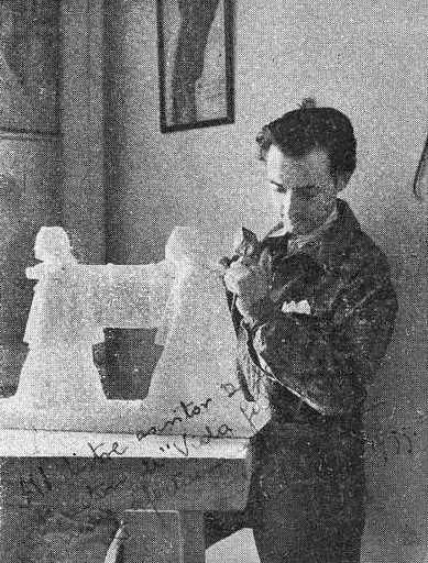 Francisco Vázquez Díaz "Compostela", fotografía en Vida Gallega 1933